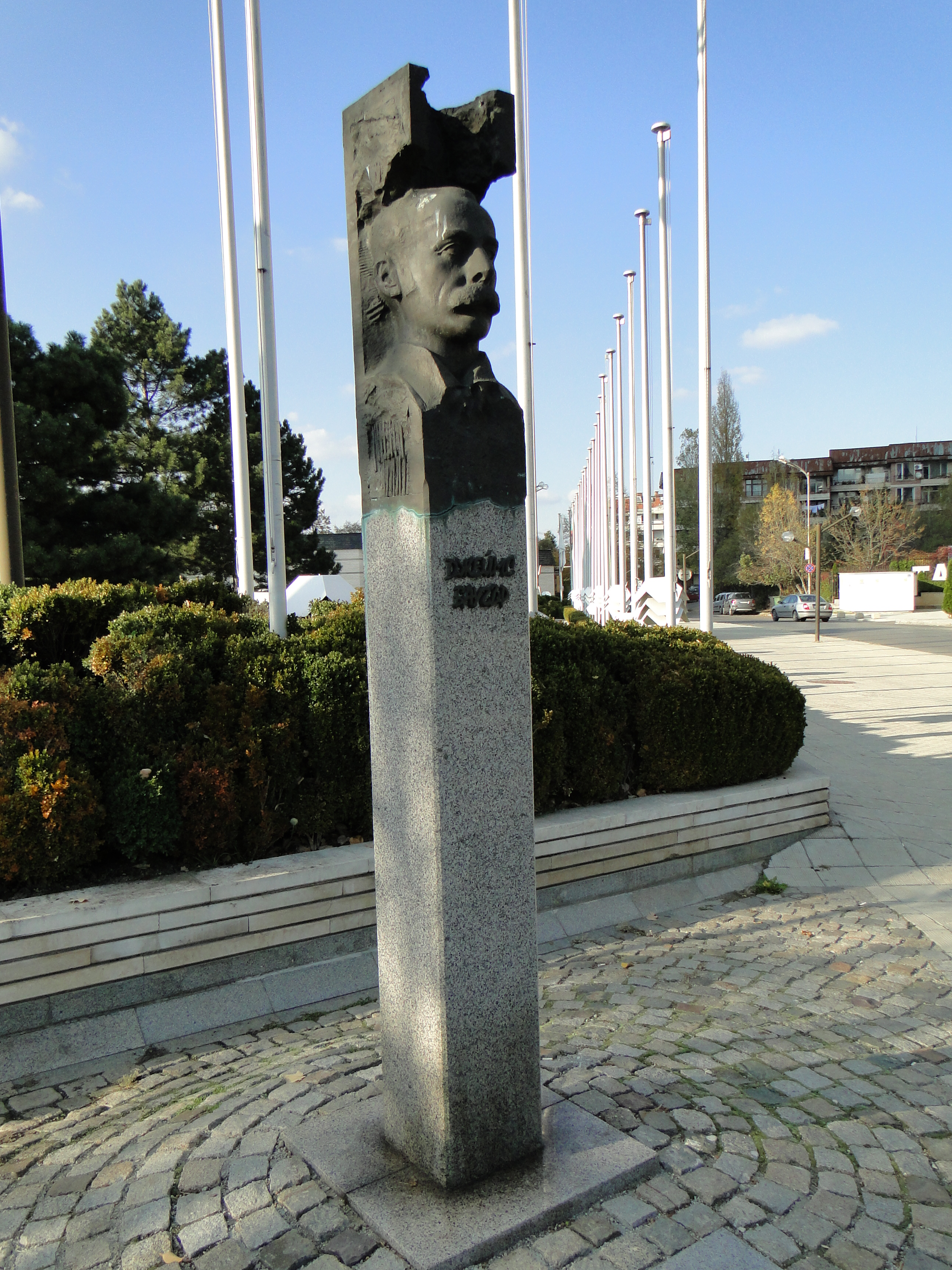 София през есента 10.November 2012